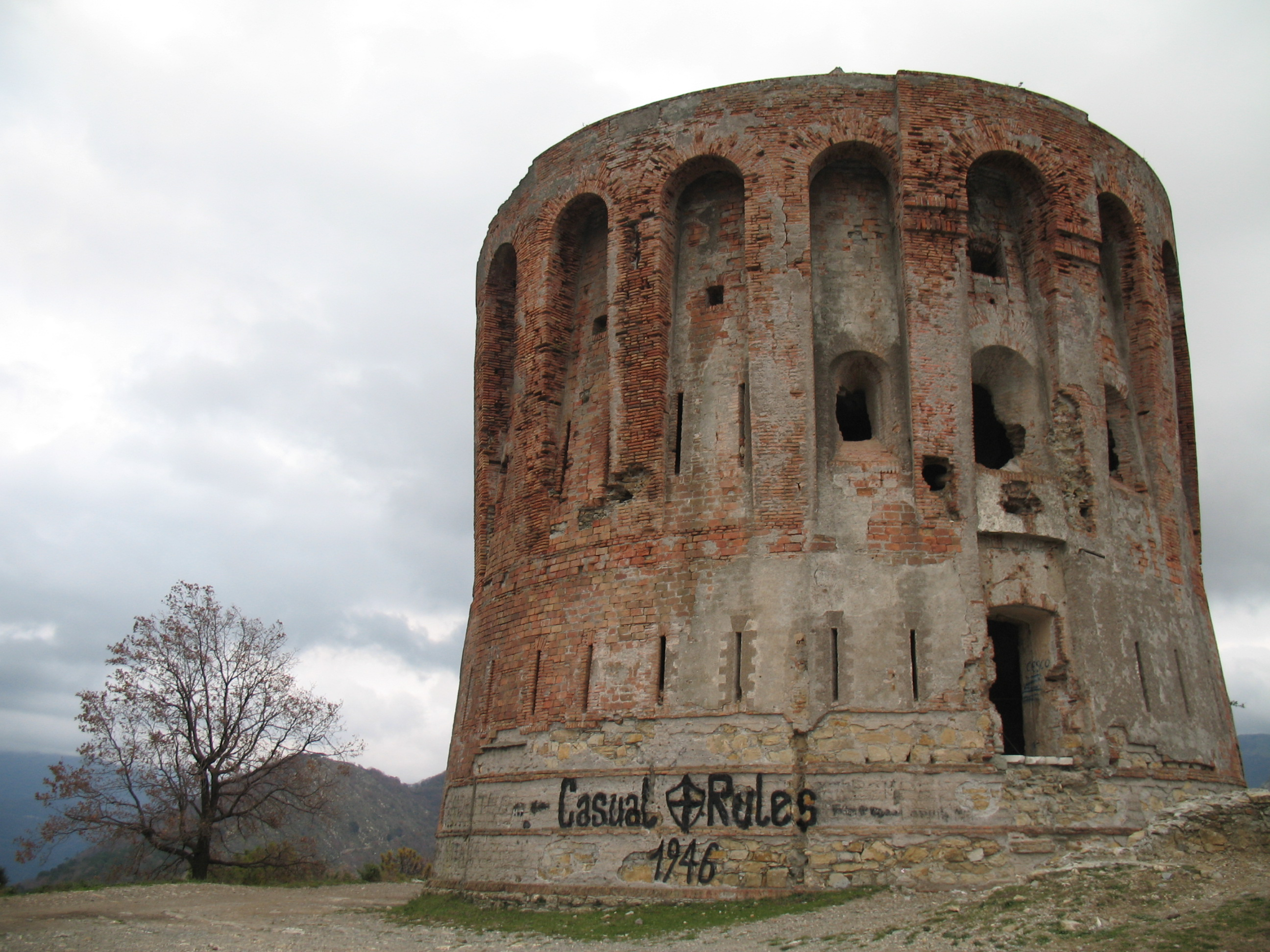 Immagine da Genova - Alture di Quezzi